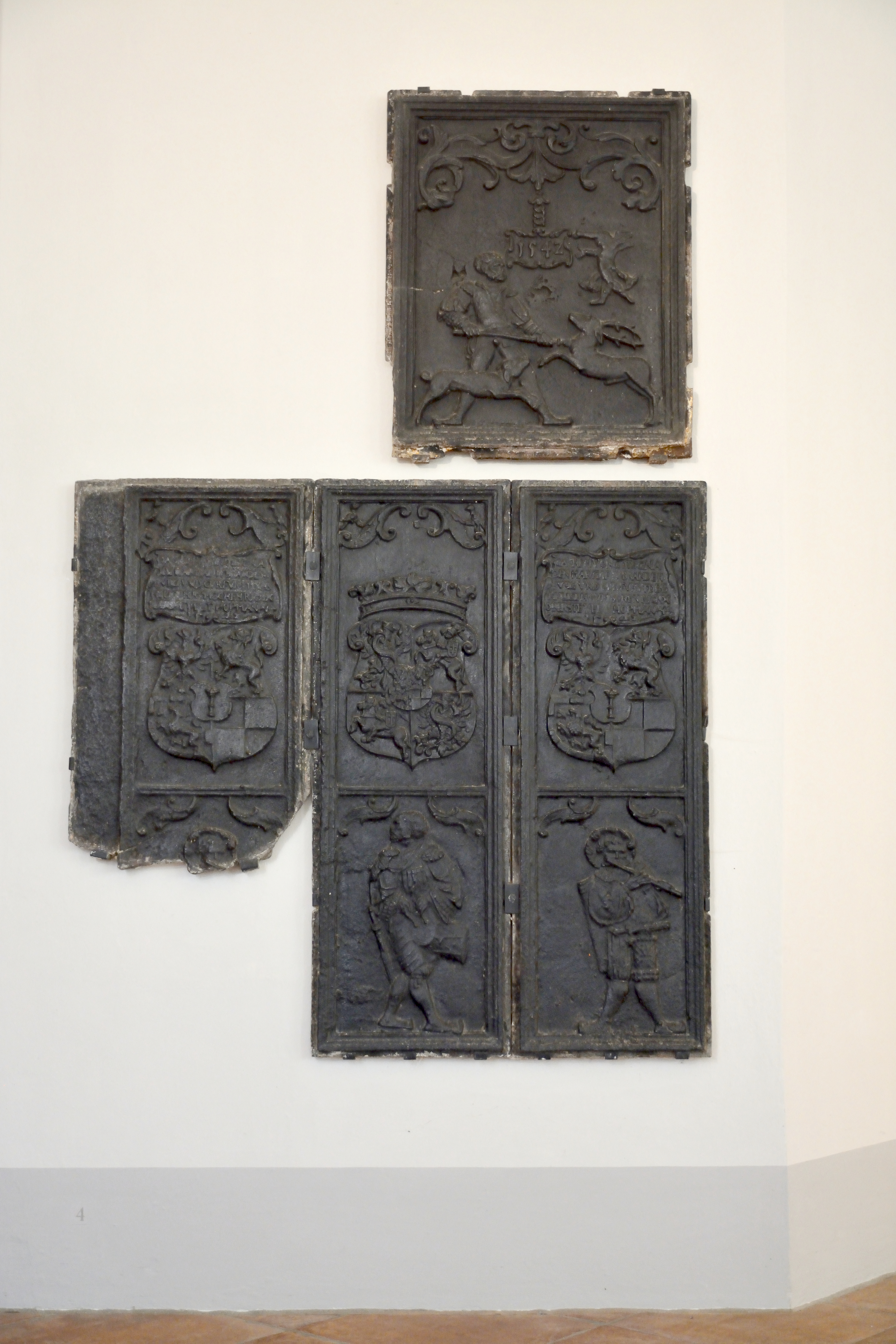 Impressionen aus dem Jagdschloss Grunewald; hier: Fotos von eisernen Ofenkacheln, die Dekoration zweier Ofenkacheln ist identisch, quadrierter Wappenschild mit dem kleinen brandenburgischen Kurwappen. Darunter in frontal gegrätschter Stellung ein Mann mit modischen Kniehosen mit verschieden gemusterten Beinen, weitärmligem Wams und Kuhmaulschuhen mit Kinnbart, der Querflöte spielt. Die mittlere Ofenplatte schmückt die polnische Prinzessinnenkrone über dem quadrierten Wappenschild mit dem polnischen Adler mit S (für König Sigismund I 1506-1546) und dem litauischen Reiter. Als Mittelschild dient das quadrierte Brandenburgische Wappen. Das Wappen nimmt Bezug auf die zweite Gemahlin Joachims II, Prinzessin Hedwig, älteste Tochter Sigismund I.. Darunter ein manieristisch gedrehter Trommler mit Kuhmaulschuhen, und Kniehosen. Die vierte Platte zeigt eine Jagdszene für den Kurfürsten als passioniertem Jäger.